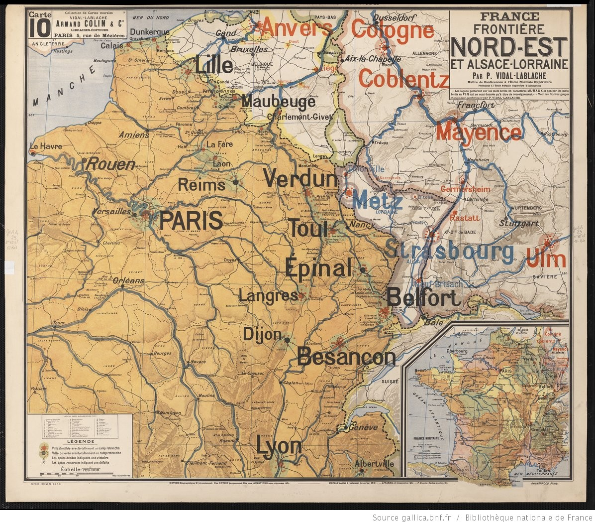 Titre : France, frontière Nord-Est et Alsace-Lorraine / par P. Vidal-Lablache... Auteur : Vidal de La Blache, Paul (1845-1918). Auteur du texte Auteur : Armand Colin (Firme). Auteur du texte Éditeur : A. Colin (Paris) Date d'édition : 19.. Sujet : Cartes militaires Sujet : France -- Cartes militaires Type : carte,image fixe Langue : Français Format : 1 flle en coul. ; 1170 x 980 Format : image/jpeg Droits : domaine public Identifiant : ark:/12148/btv1b52503834f Source : Bibliothèque nationale de France, département Cartes et plans, GE AA-25 (10 A) Relation : Couverture : France Description : Échelle(s) : 1:729 000 Provenance : bnf.fr Date de mise en ligne : 18/02/2014